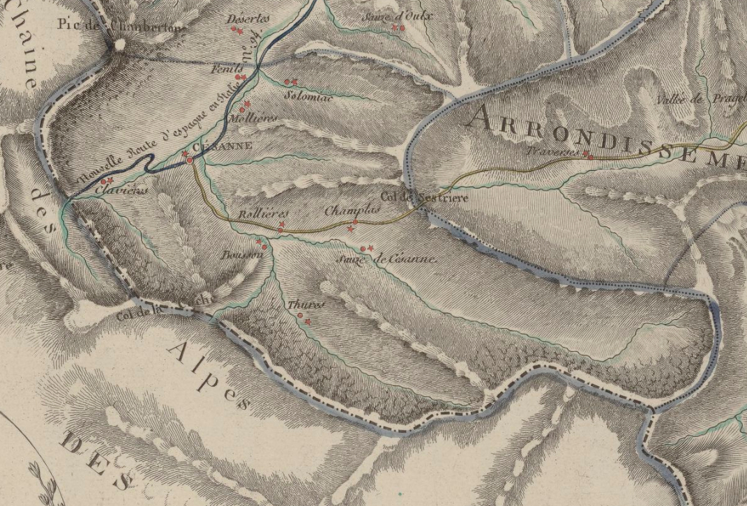 Mapa del canton de Cesana dins lo departament de Po (1802-1814).